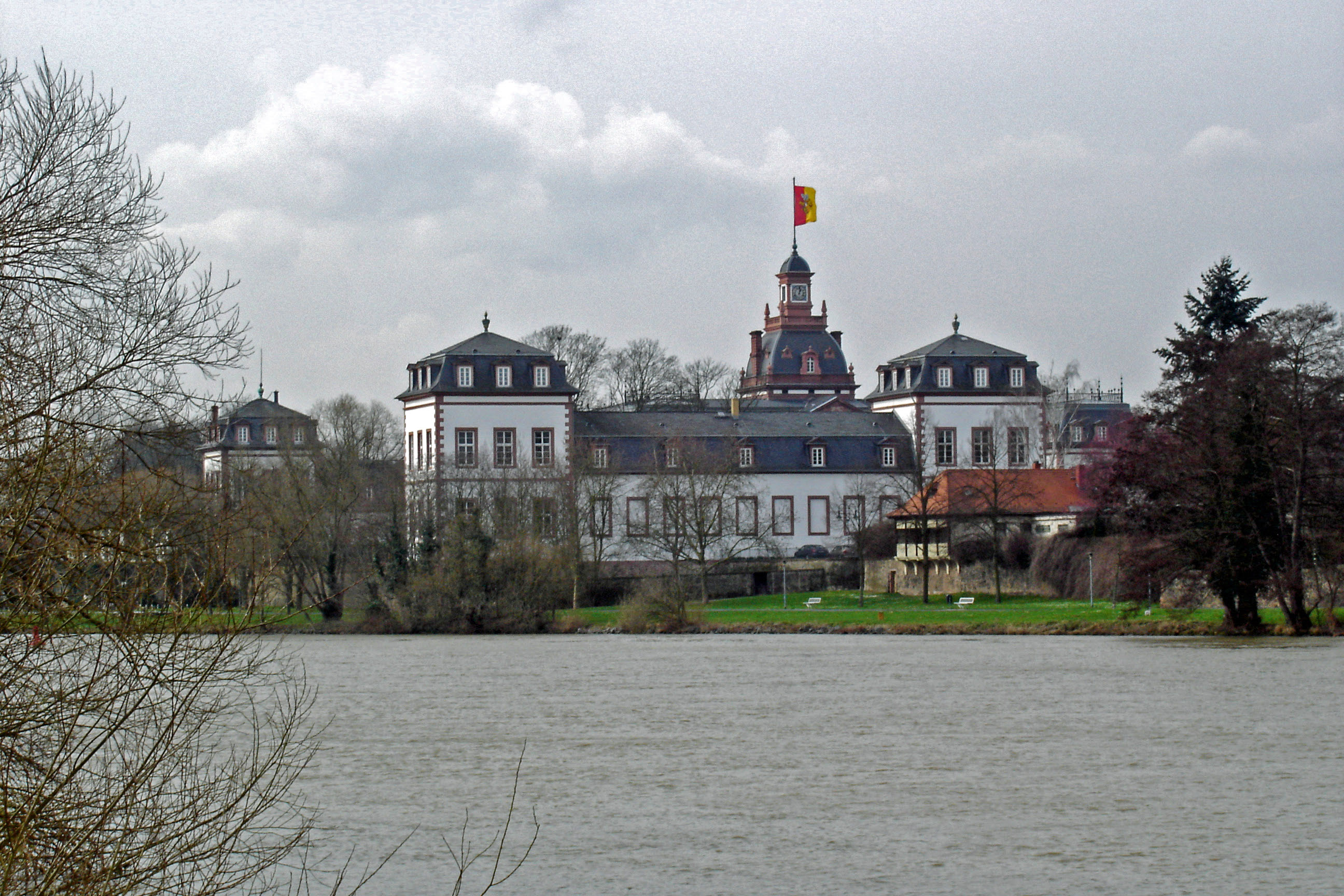 Historisches Museum, Schloss Philipsruhe in Hanau